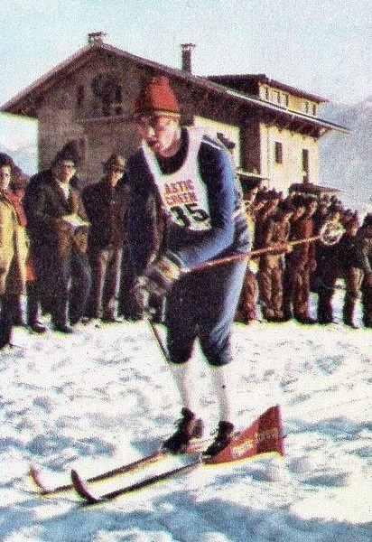 Figurina CAMPIONI dello SPORT 1969/70-n.388- KOSTNER- ITALIA -SCI FONDO-Rec